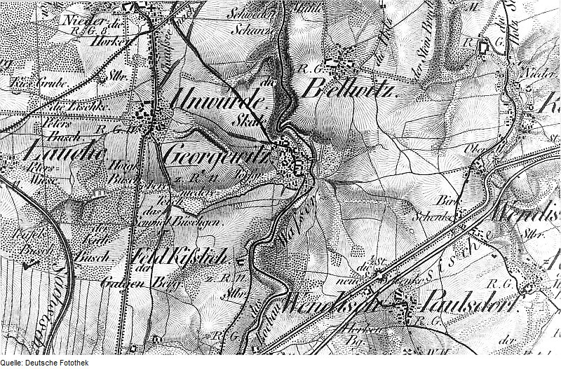 Original image description from the Deutsche Fotothek Löbau-Georgewitz. Oberreit, Sect. Zittau, 1844/46